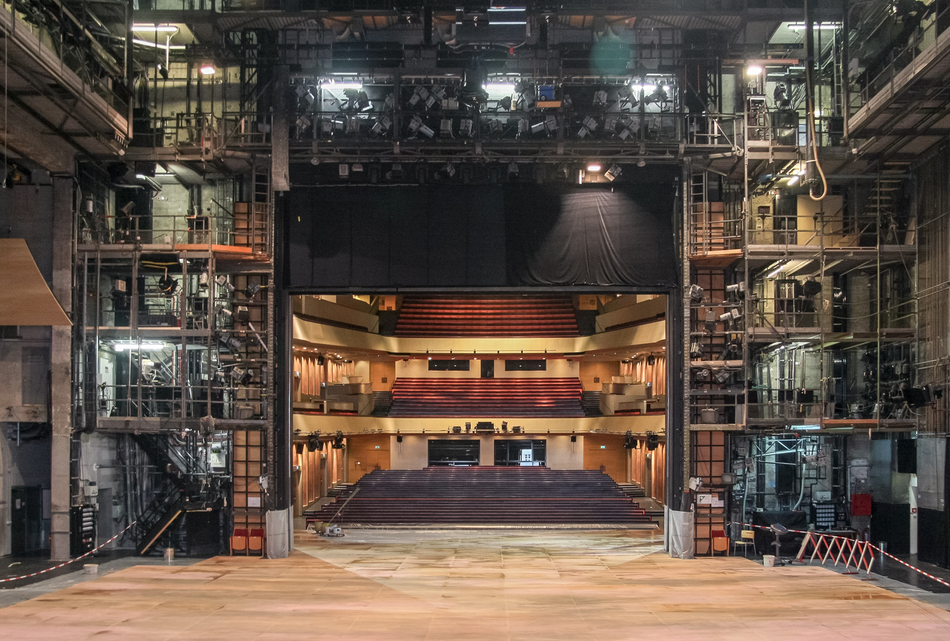 Blick über die Bühne des Hauses für Mozart Salzburg in den Zuschauerraum